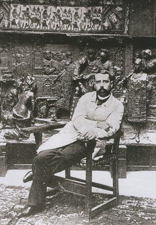 El artista sevillano Antonio Susillo